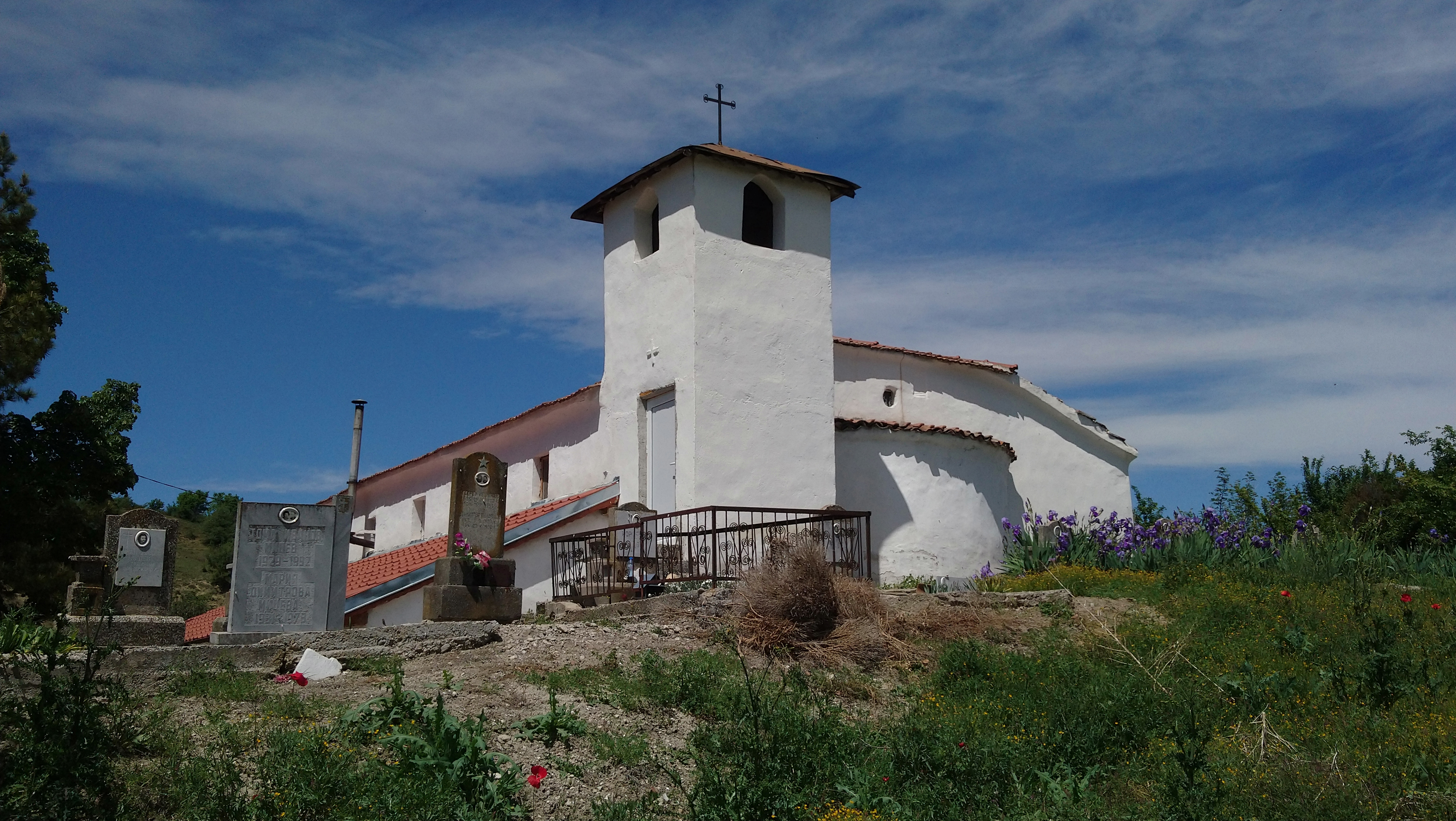 Църквата Св Георги в село Долно Спанчево